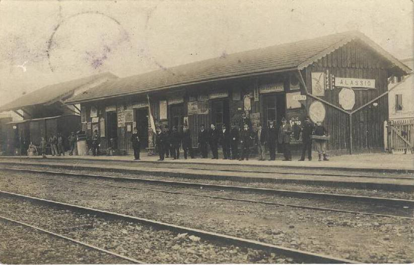 Stazione ferroviaria di Alassio, il vecchio fabbricato viaggiatori in legno.